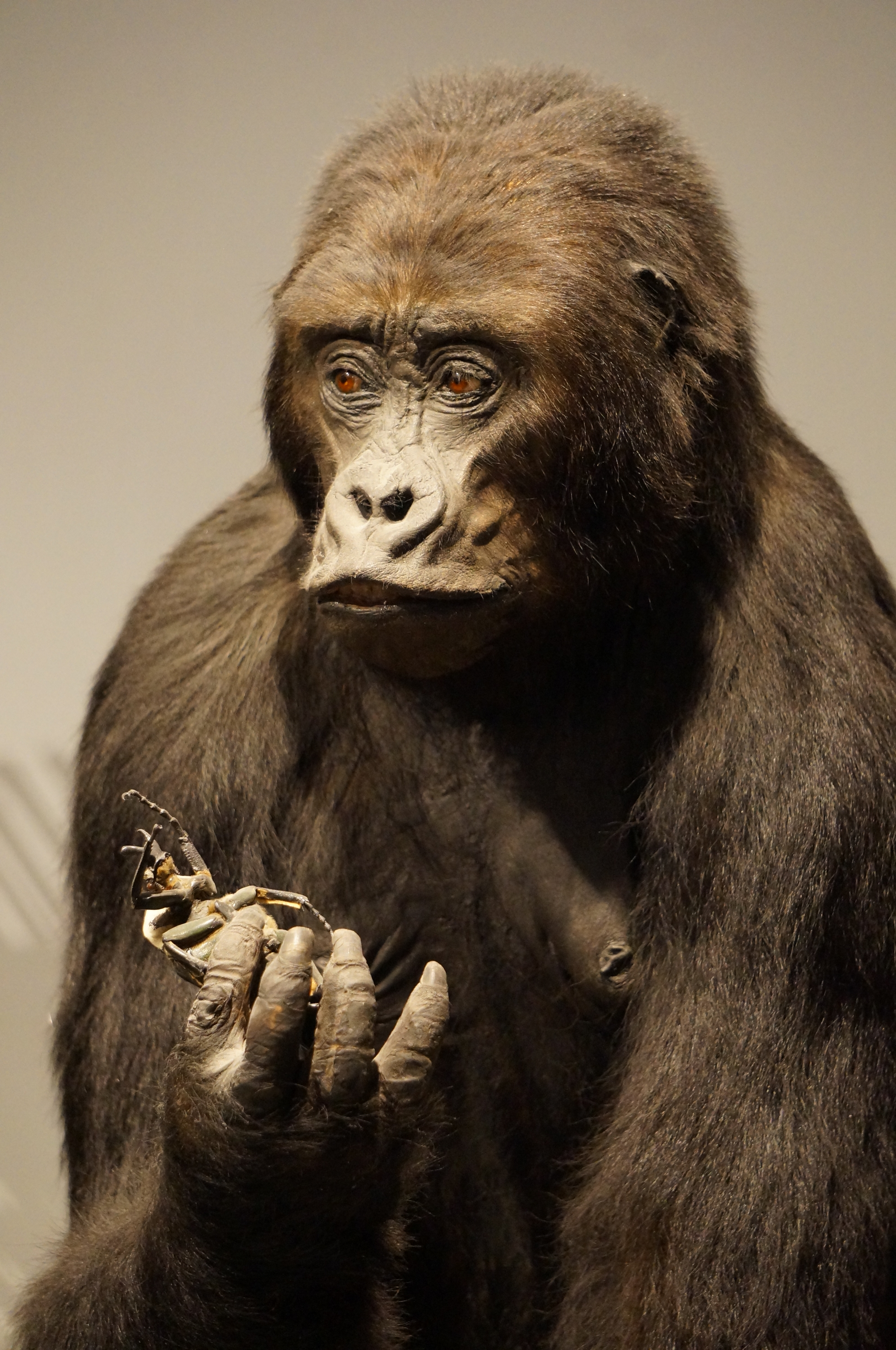 gorilla beringei graueri